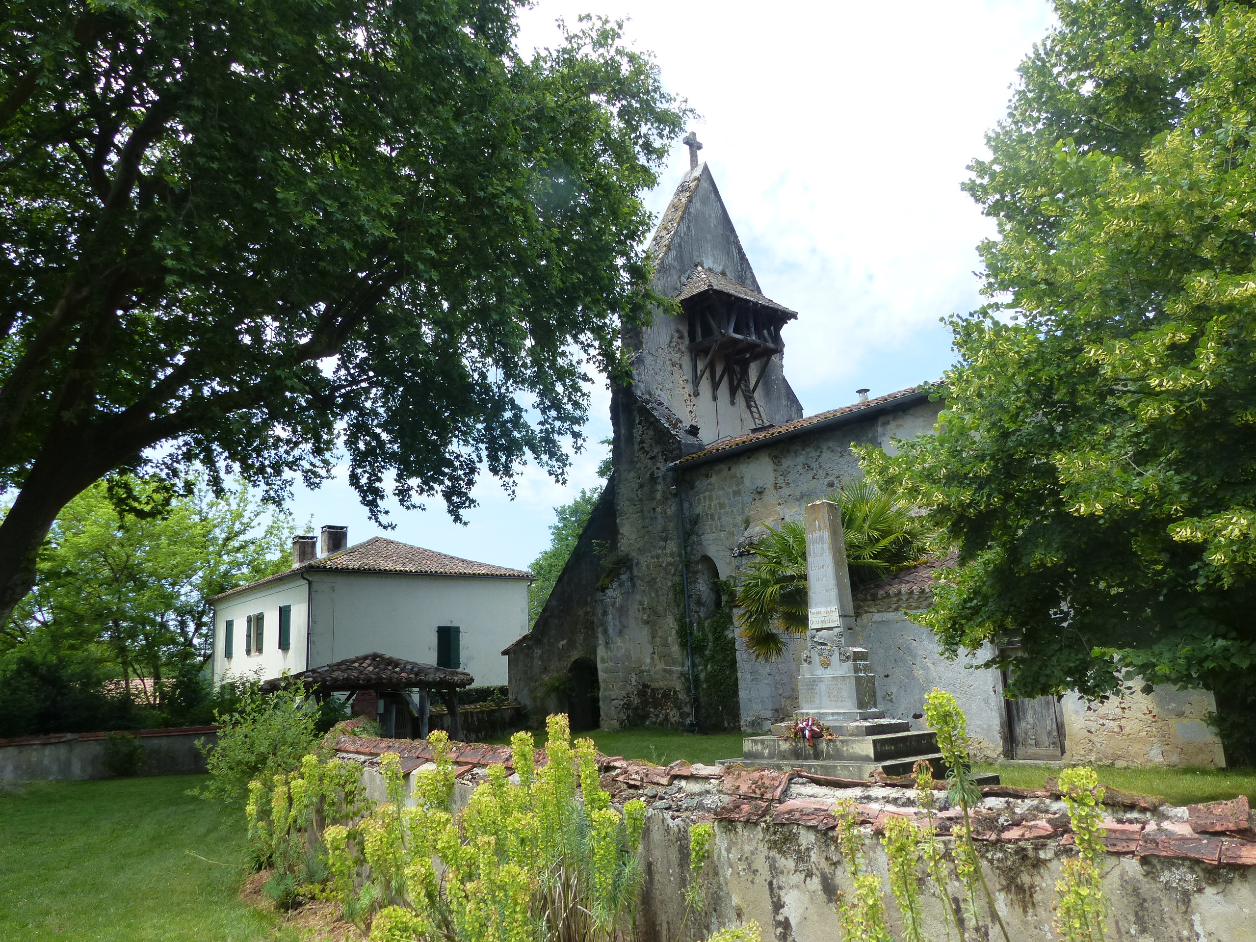 L'église Saint-Martin d'Estampon (commune de Losse, Landes, France)